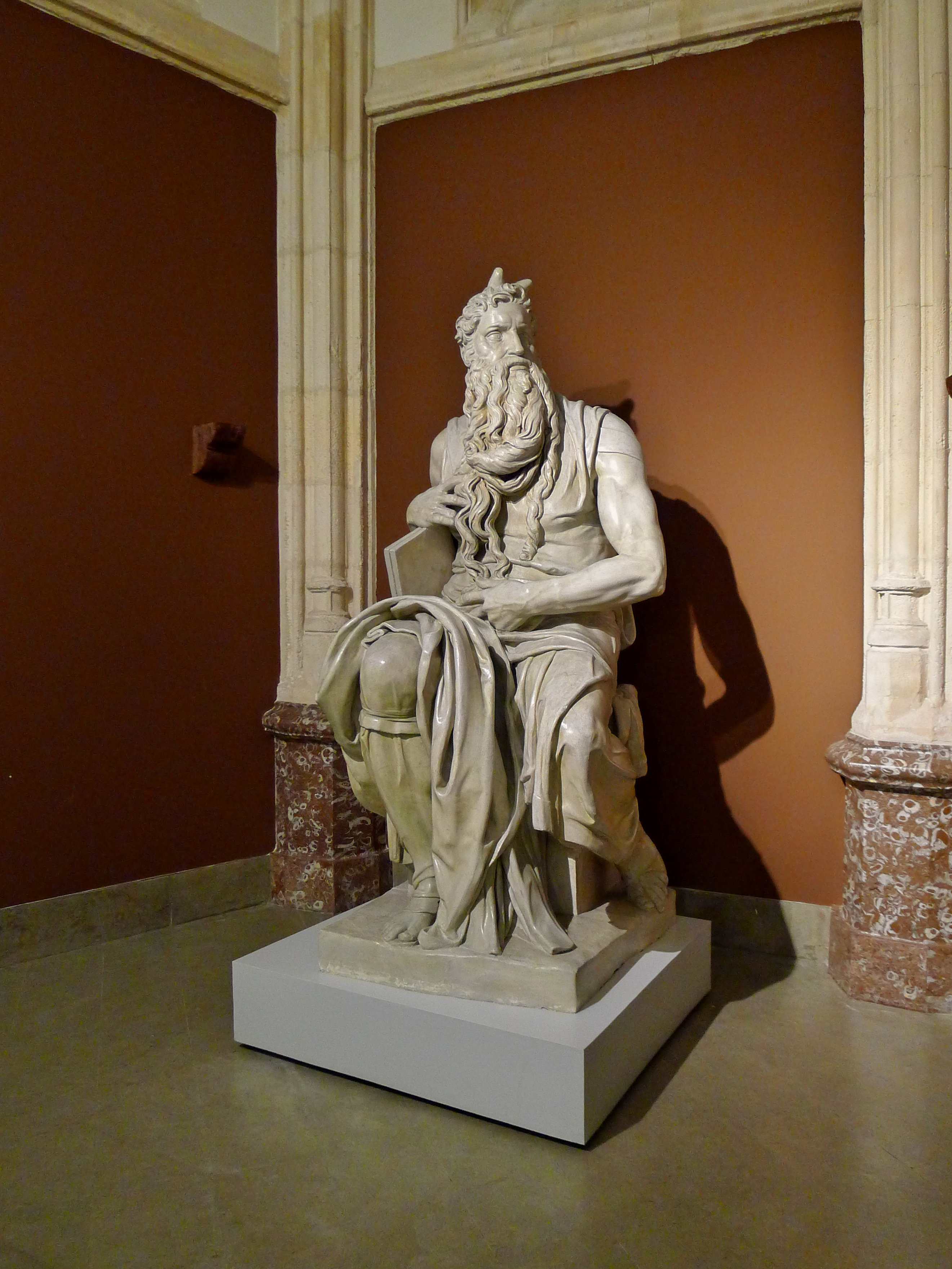 Copia exacta de la famosa obra (1509) en el Museo de Reproducciones de Bilbao.